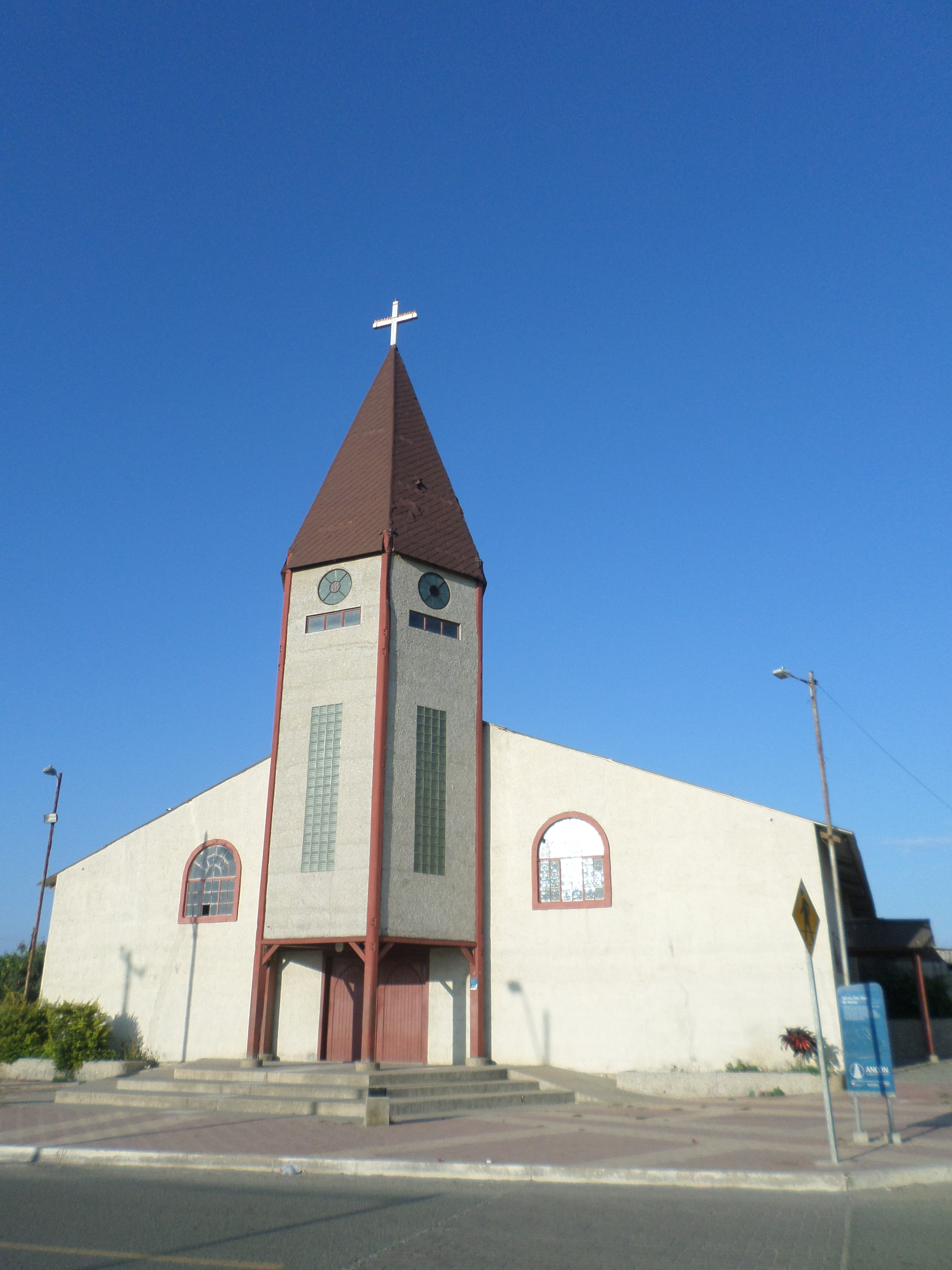 Iglesia de San José de Ancón